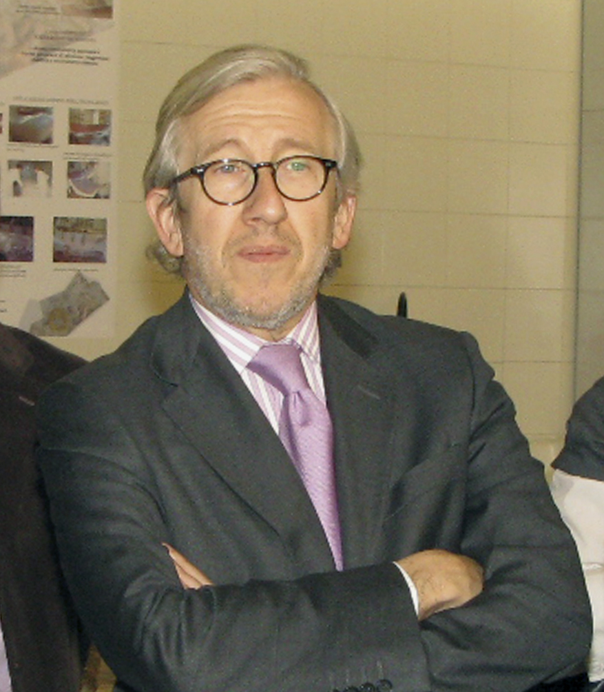 Philippe Bélaval en 2011 à l'Institut supérieur pour la conservation et la restauration.